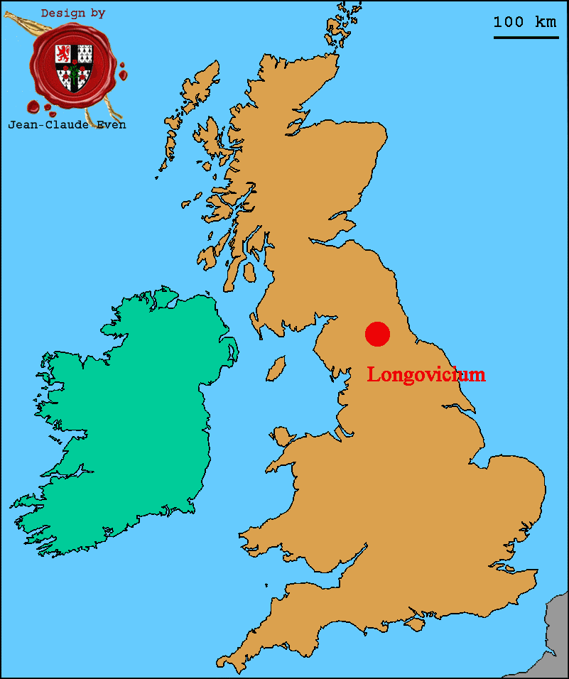 Lanchester - Longovicium